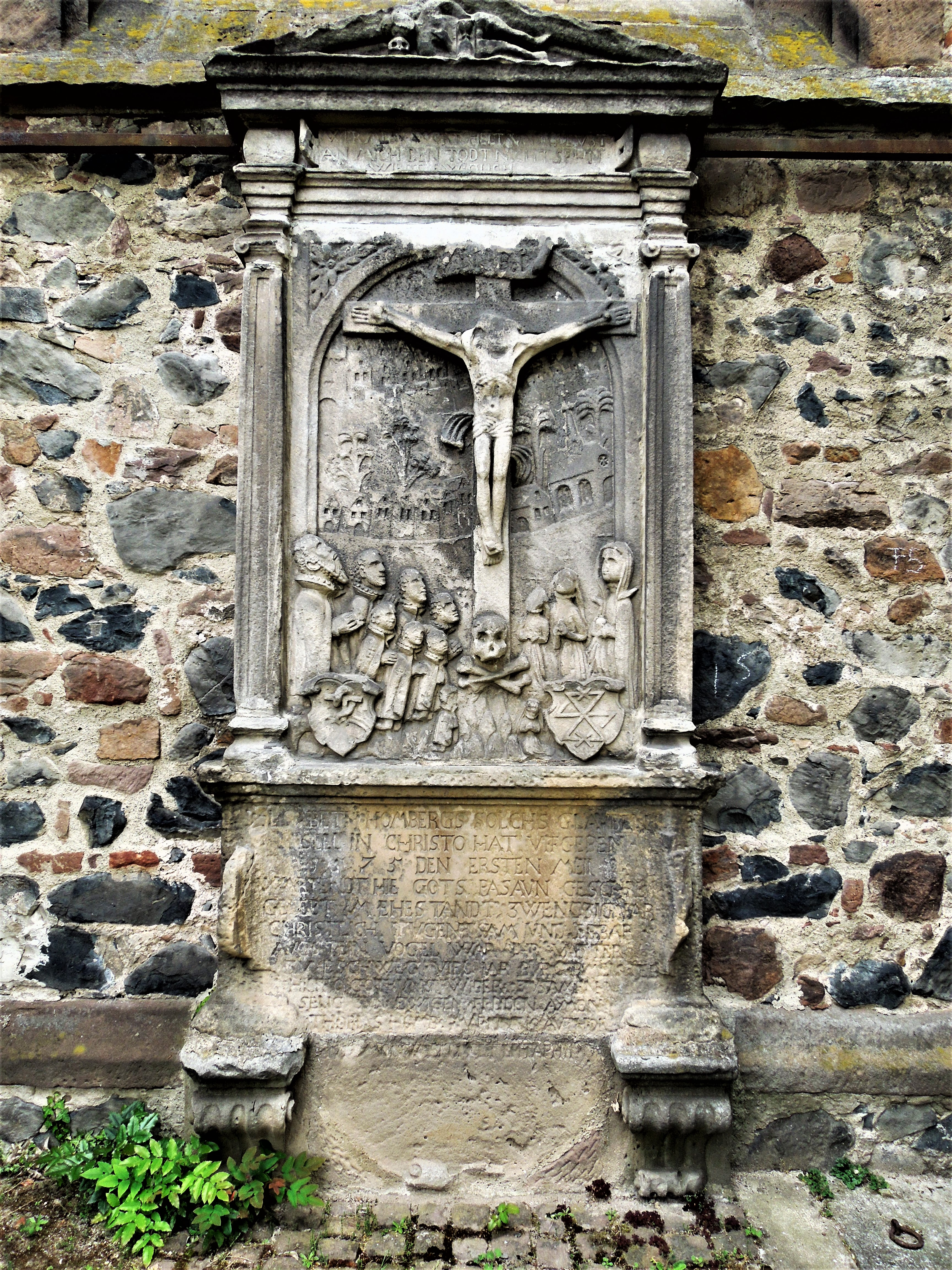 Fritzlar, Epitaph an der Außenmauer der ev. Stadtkirche